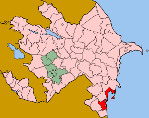 Map of Azerbaijan showing Lankaran (Lənkəran) rayon.